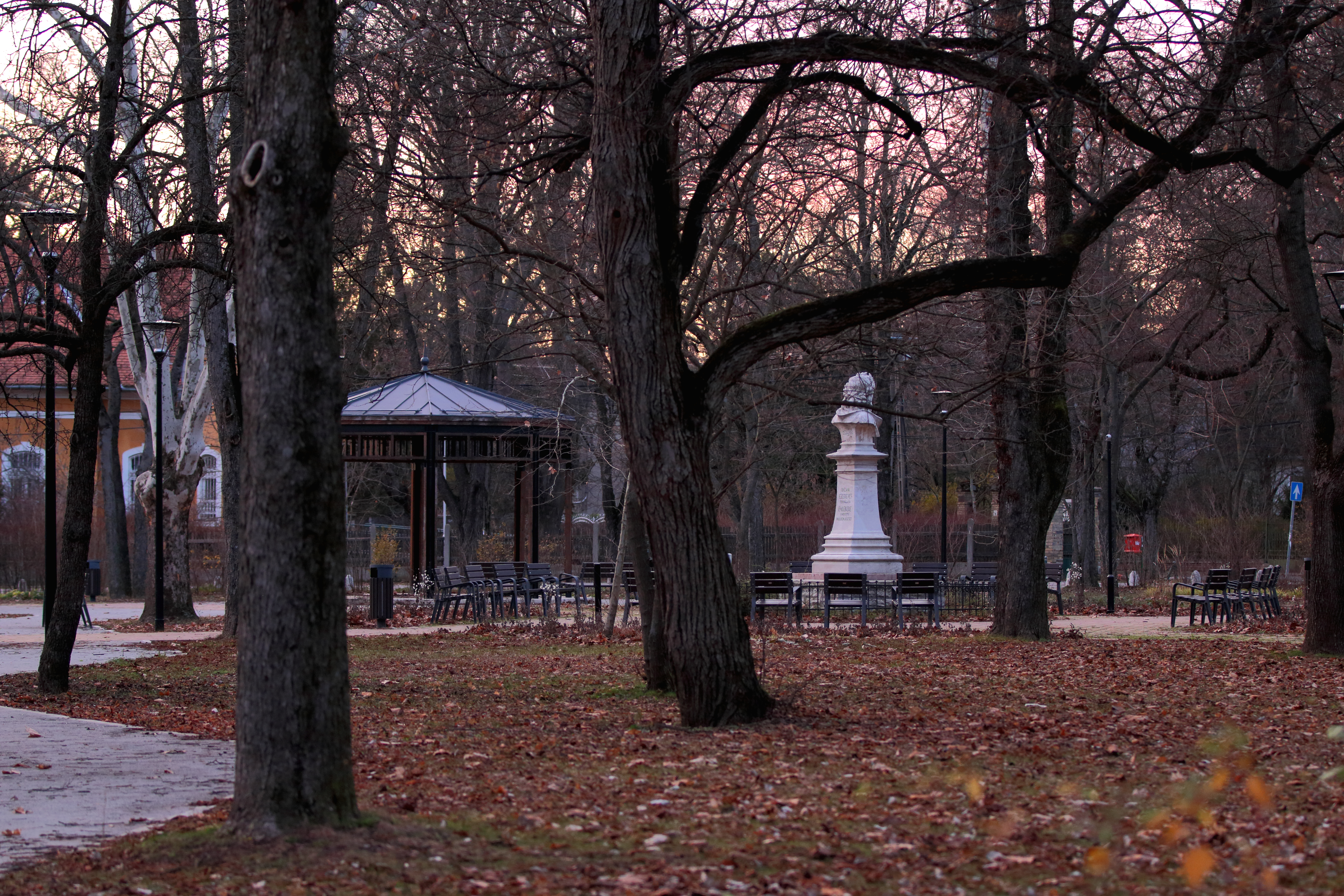 Mátyás Király tér a zenepavilonnal és a Mátyás király szoborral